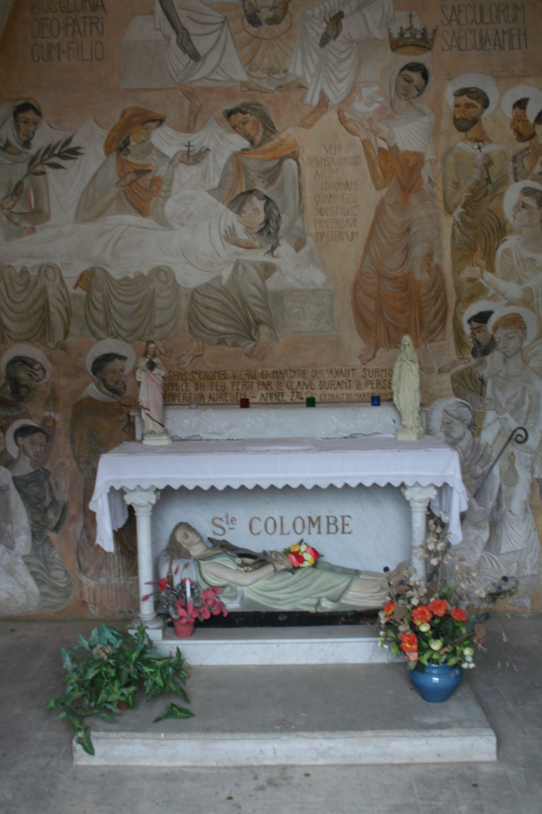 Colombières-sur-Orb (Hérault) - autel et fresques de la chapelle Sainte-Colombe.